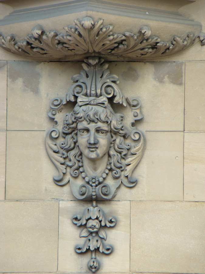 Uhlandstraße 57 in Heilbronn, Fassadendetail